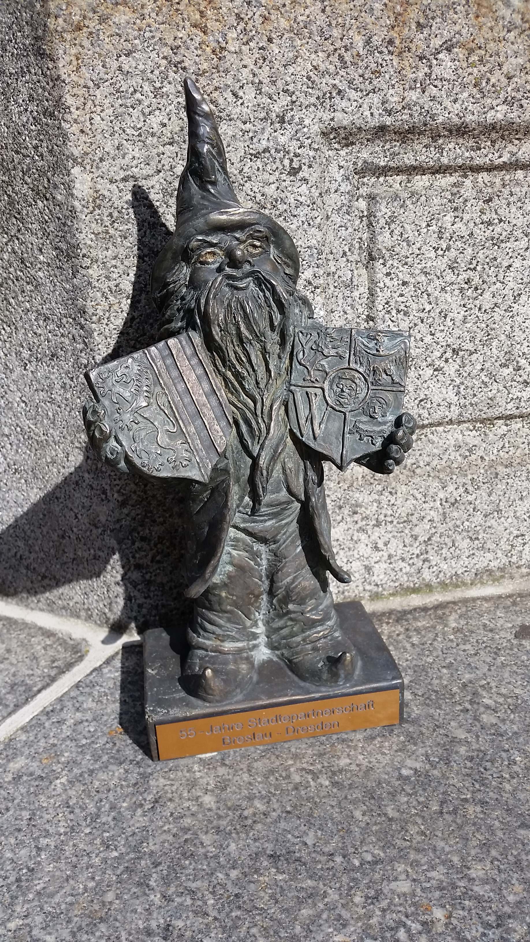 Breslauer Zwerg am Hietzigbrunnen (alternativ: Rathausbrunnen) in der Inneren Altstadt von Dresden.